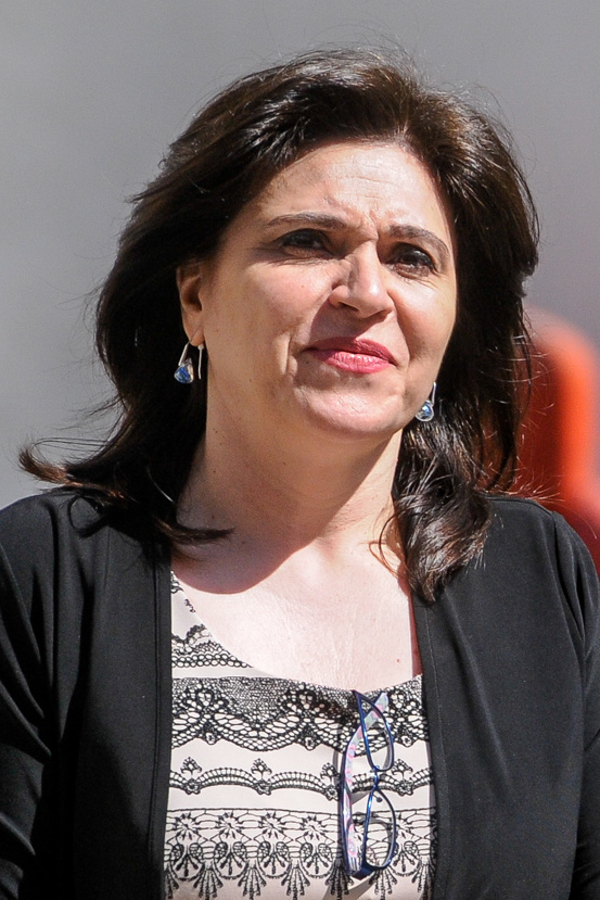 Comité Político